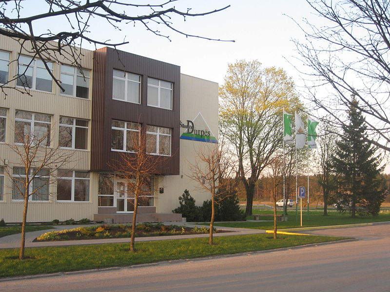 Durpių įmonė Traksėdžiuose